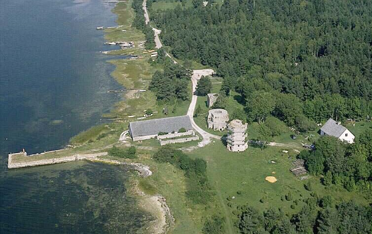 Motiv: Barläst Nyckelord: Flygbilder, Riksintressen Kategori: Utv malm/mineralBarläst